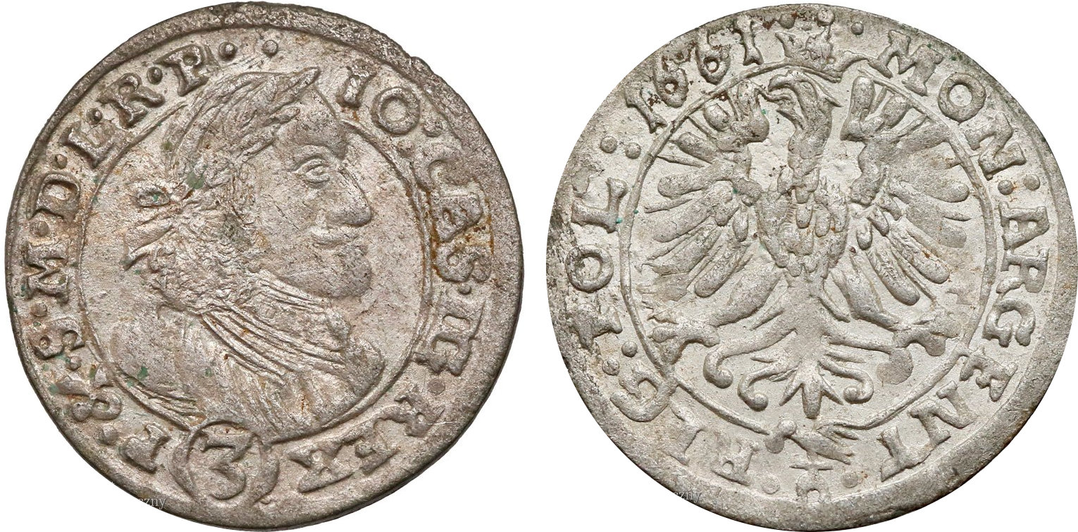 3 krajcary 1661 Opole